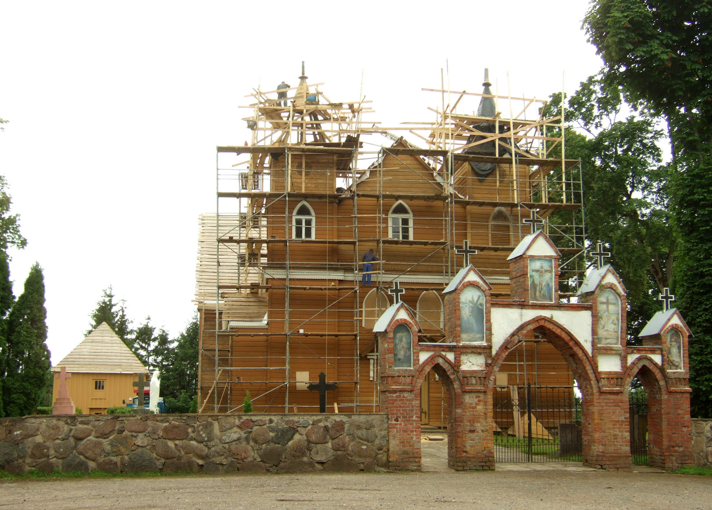 Notėnų Šv. kankinės Kotrynos bažnyčia (remontuojama)